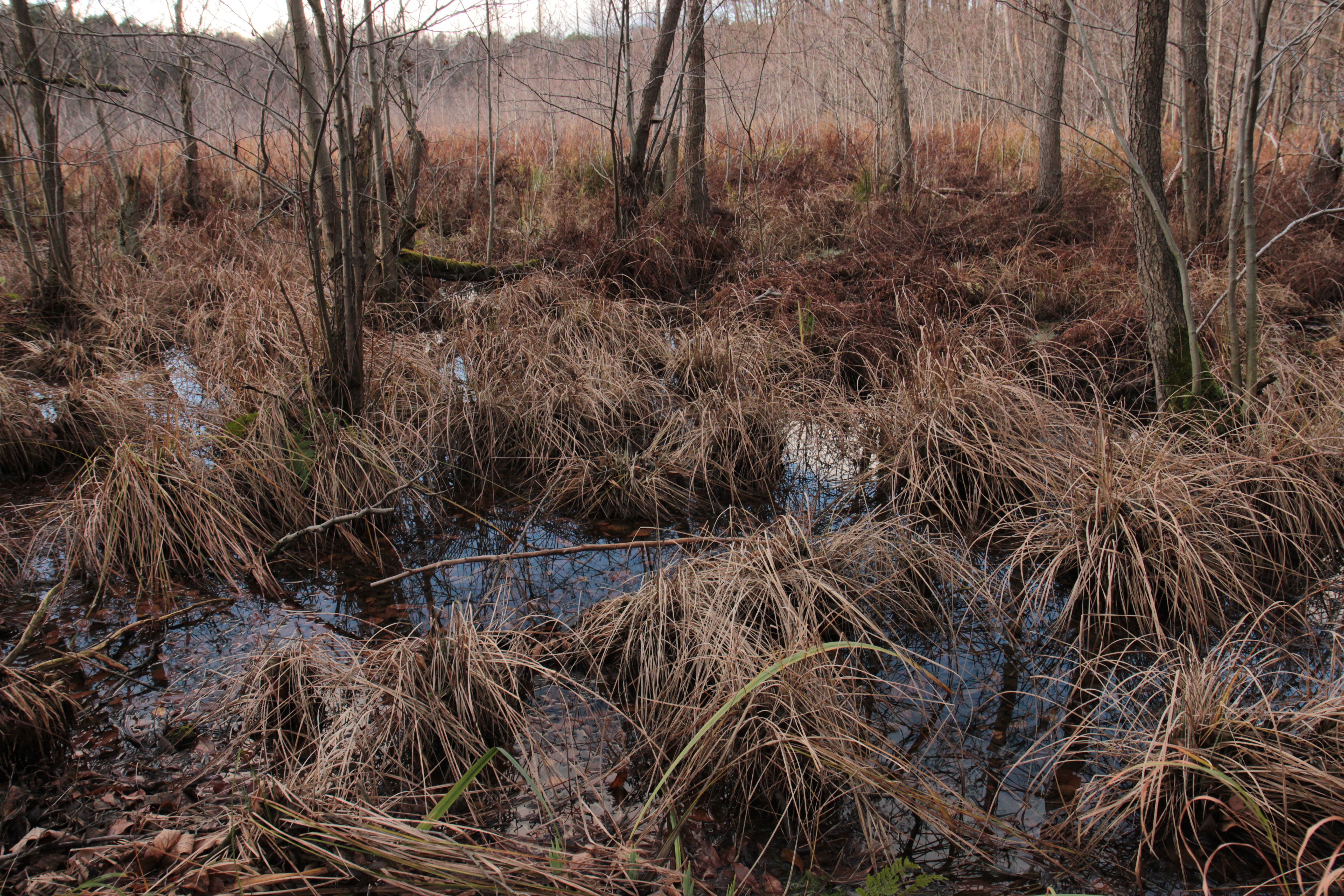 das Wasser hat sich den meisten Platz an der Oberfläche erkämpft. Pflanzen / Bäume stehen im Wasser kleinere Gewächse sind abgestorben